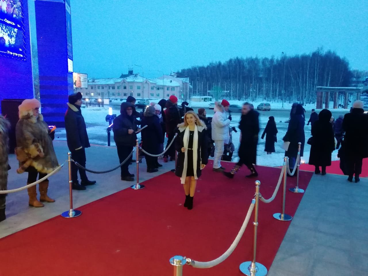 Красная дорожка - Фестиваль Дух огня ЮГРА - Анна Барсукова